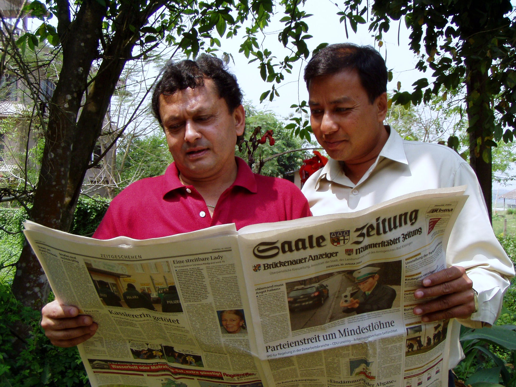 Leser der Saale-Zeitung in Nepal